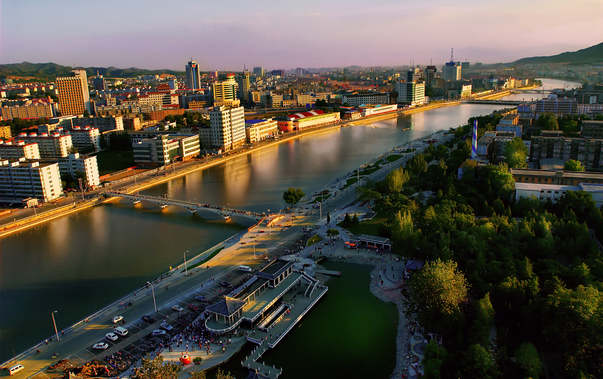 张家口市清水河，其中横贯全图的河流为清水河，由近至远的桥梁分别为清园桥（步行桥）、解放桥、清河桥。中下为张家口市人民公园。